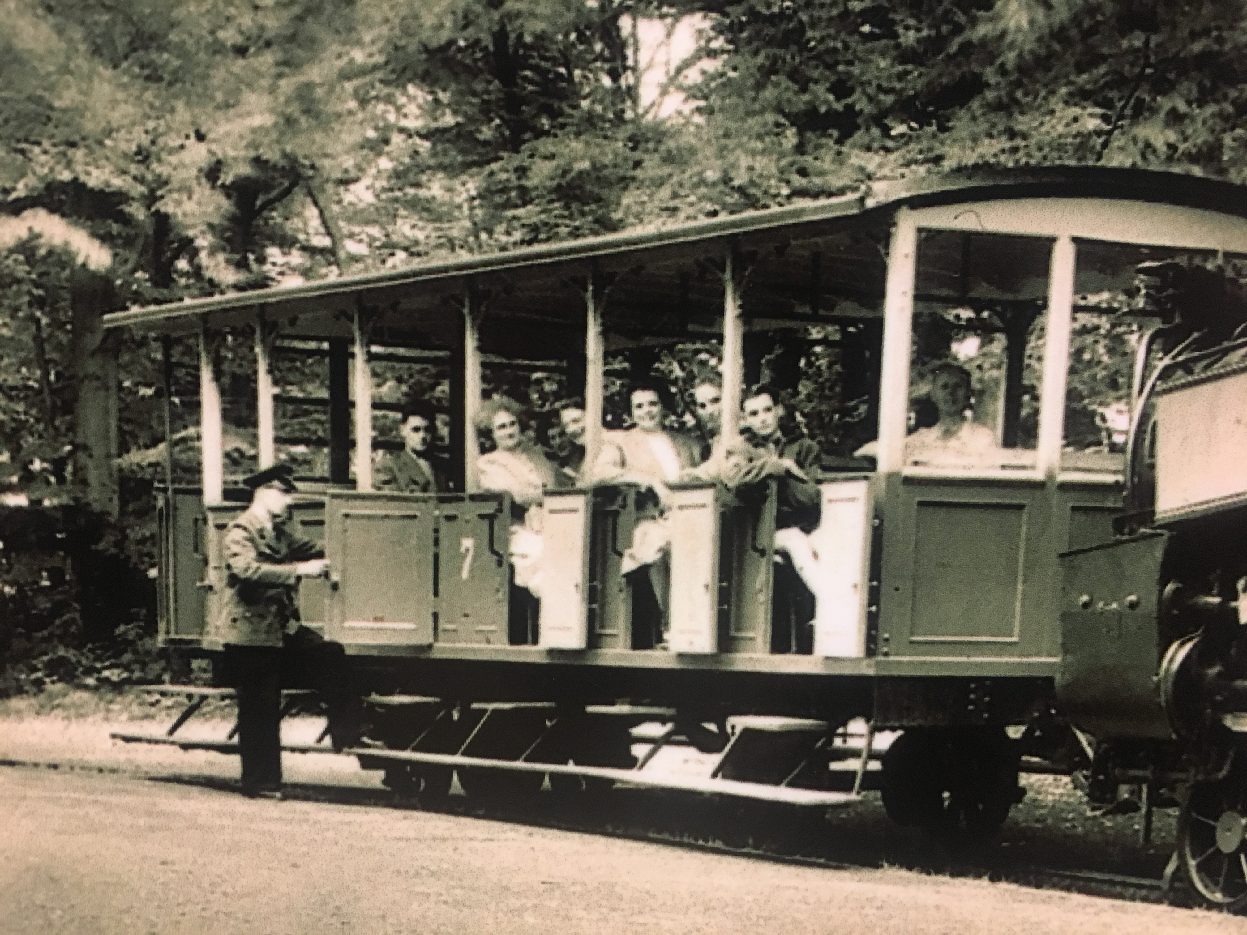 Vorstellwagen 1 (7) der Petersbergbahn, ME, 1889